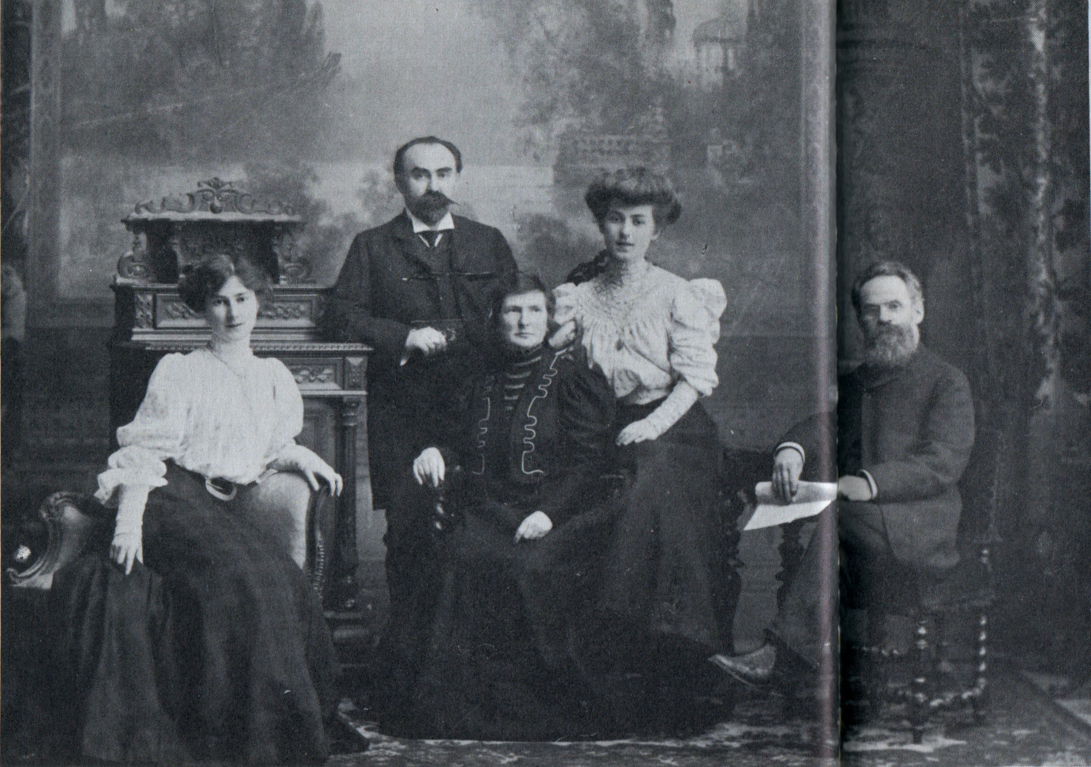 La familia de Georgi Plejánov y Lev Deich en Ginebra en 1907. De izquierda a derecha: Lidia, Plejánov, Rosalía, Eugenia y Lev Deich.